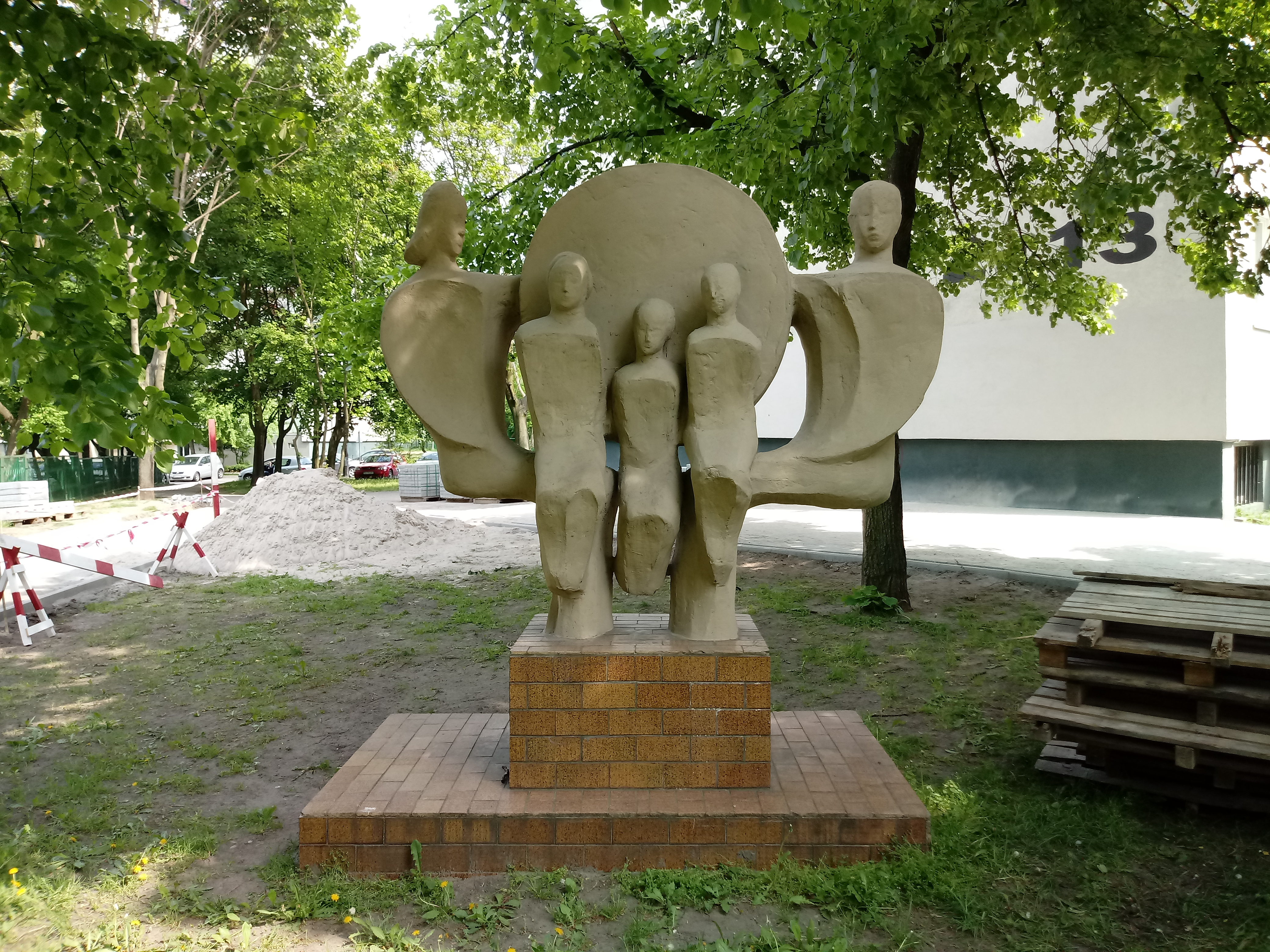 Rzeźba plenerowa Rodzina. Autor: Helena Ertel-Jakubowska, 1981, beton. Os. Lecha w Poznaniu.